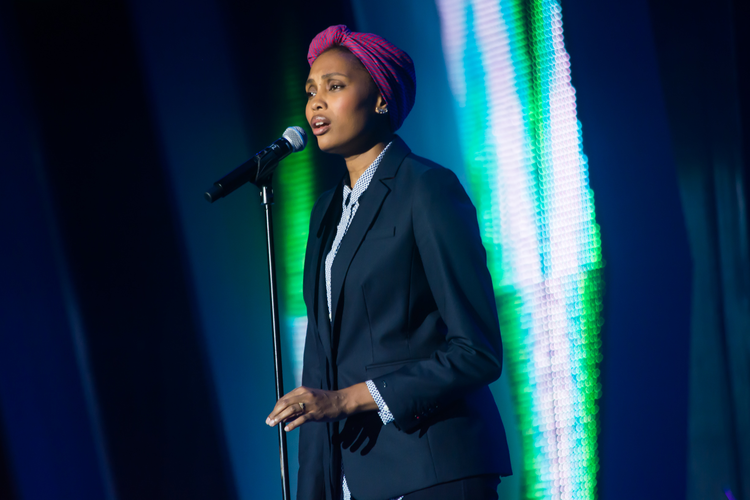 Imany на Europa Plus TV. Hit Non Stop в Витебске 2016